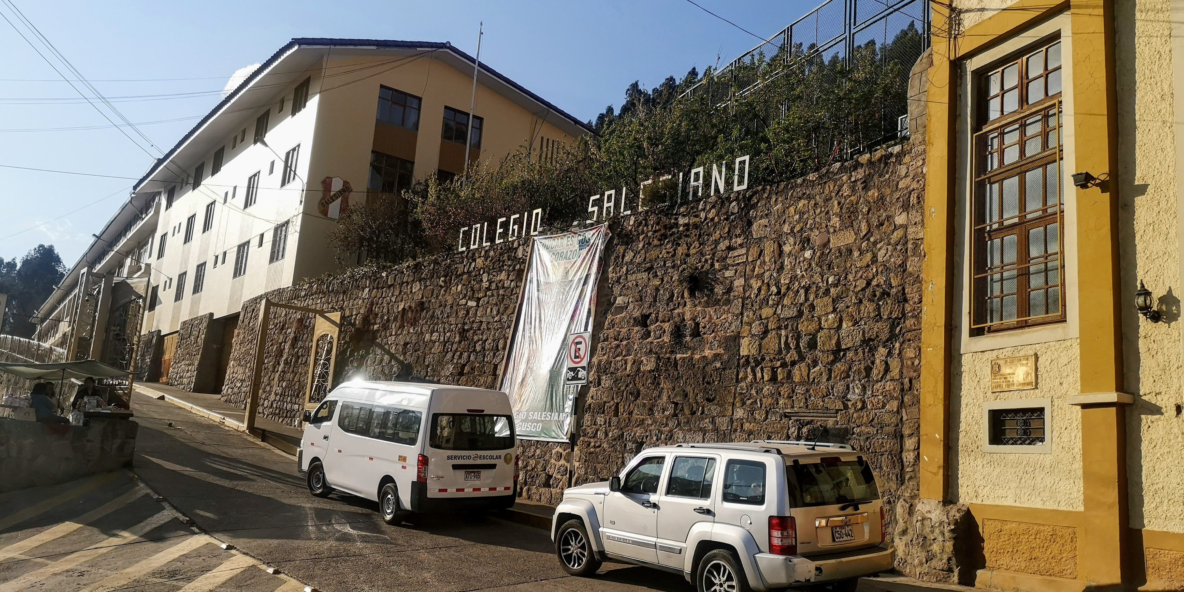 Vista del Colegio Salesiano del Cusco.